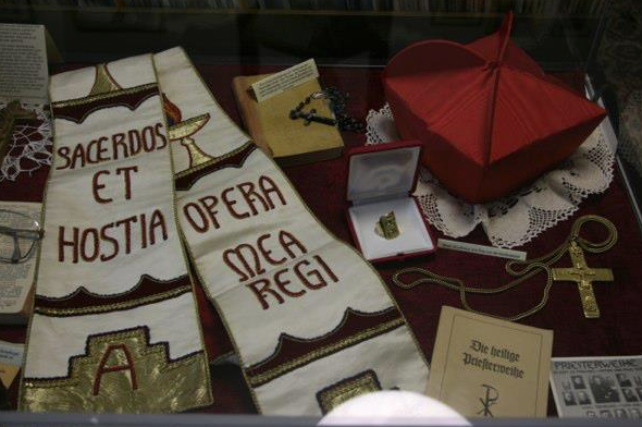 Kardinal Scheffczyk's Stole, pectoral cross, biretta and other devotional items